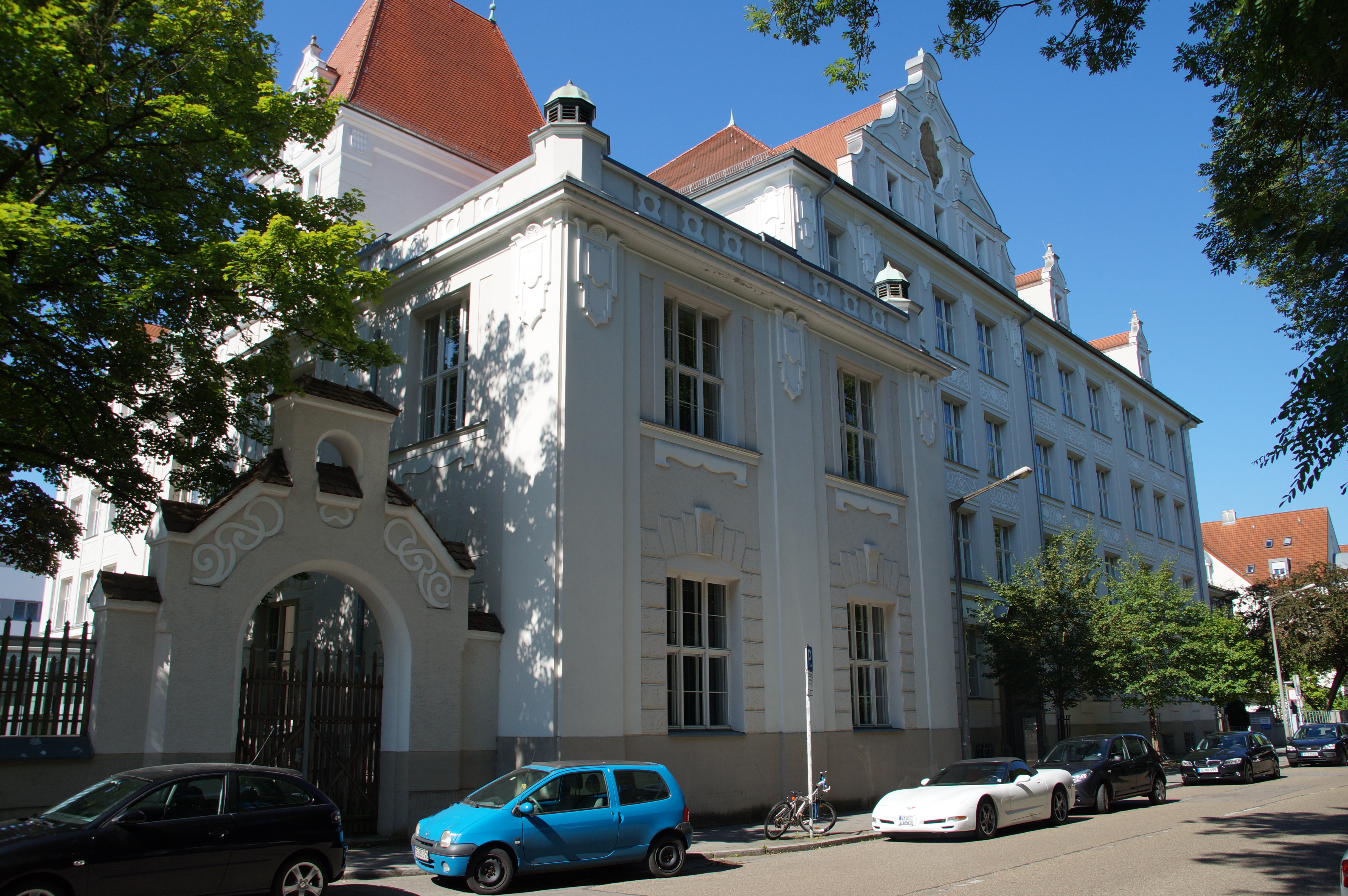 Ehemalige Augustenschule, jetzt Justizgebäude, zweiflügeliger und viergeschossiger, gegliederter Walmdachbau mit turmartigem Aufbau und Zwerchhaus mit Schweifgiebel, seitlich angegliederte, zweigeschossige Turnhalle mit Dachgalerie, Putzgliederungen Neurenaissance, 1901 von Adolf Schmetzer